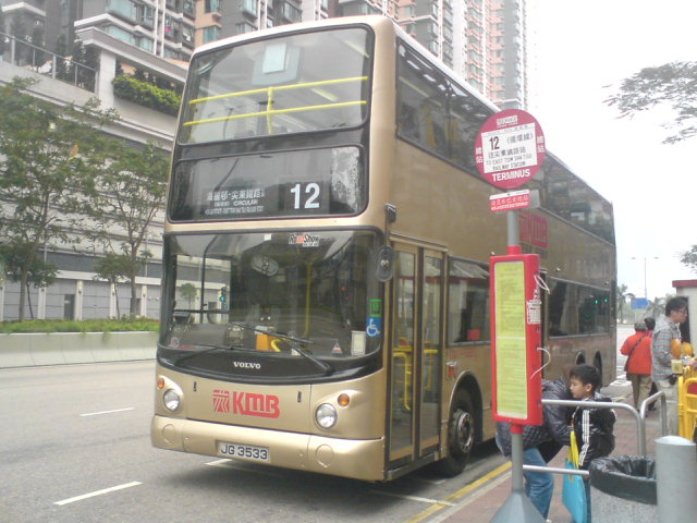 中文（香港）: 海麗邨、九巴12線巴士。